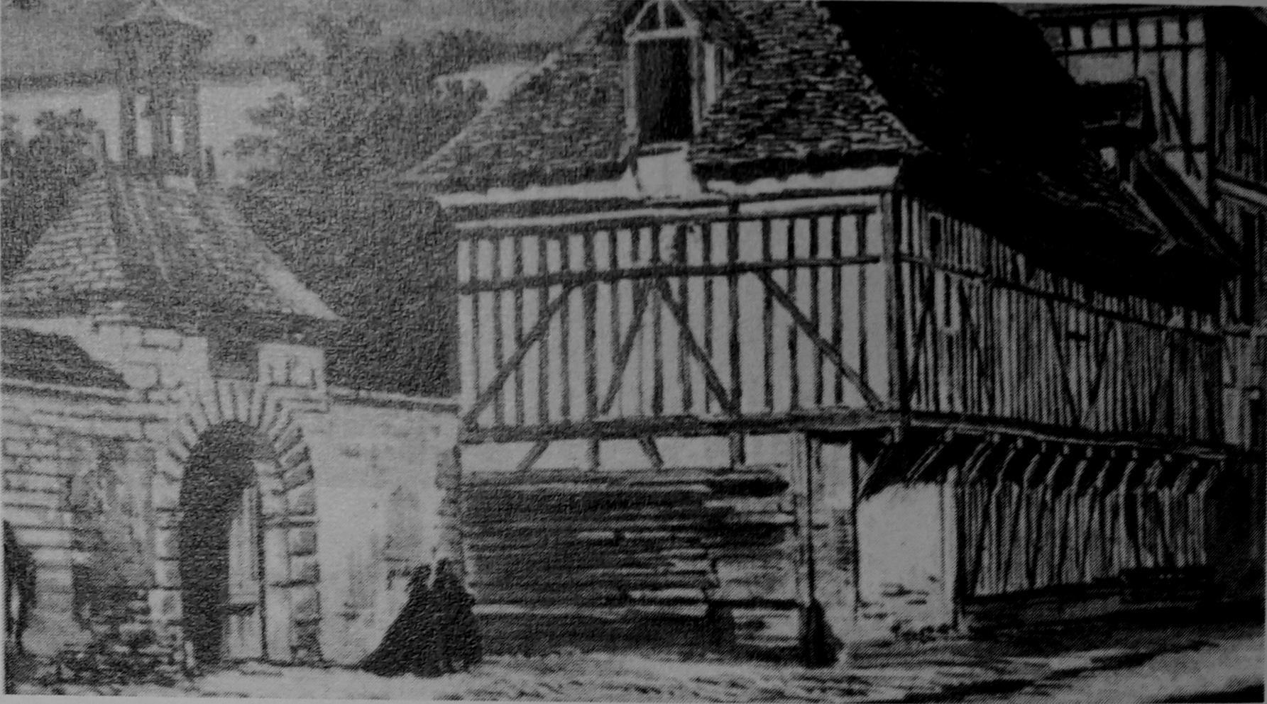 façade du collège.